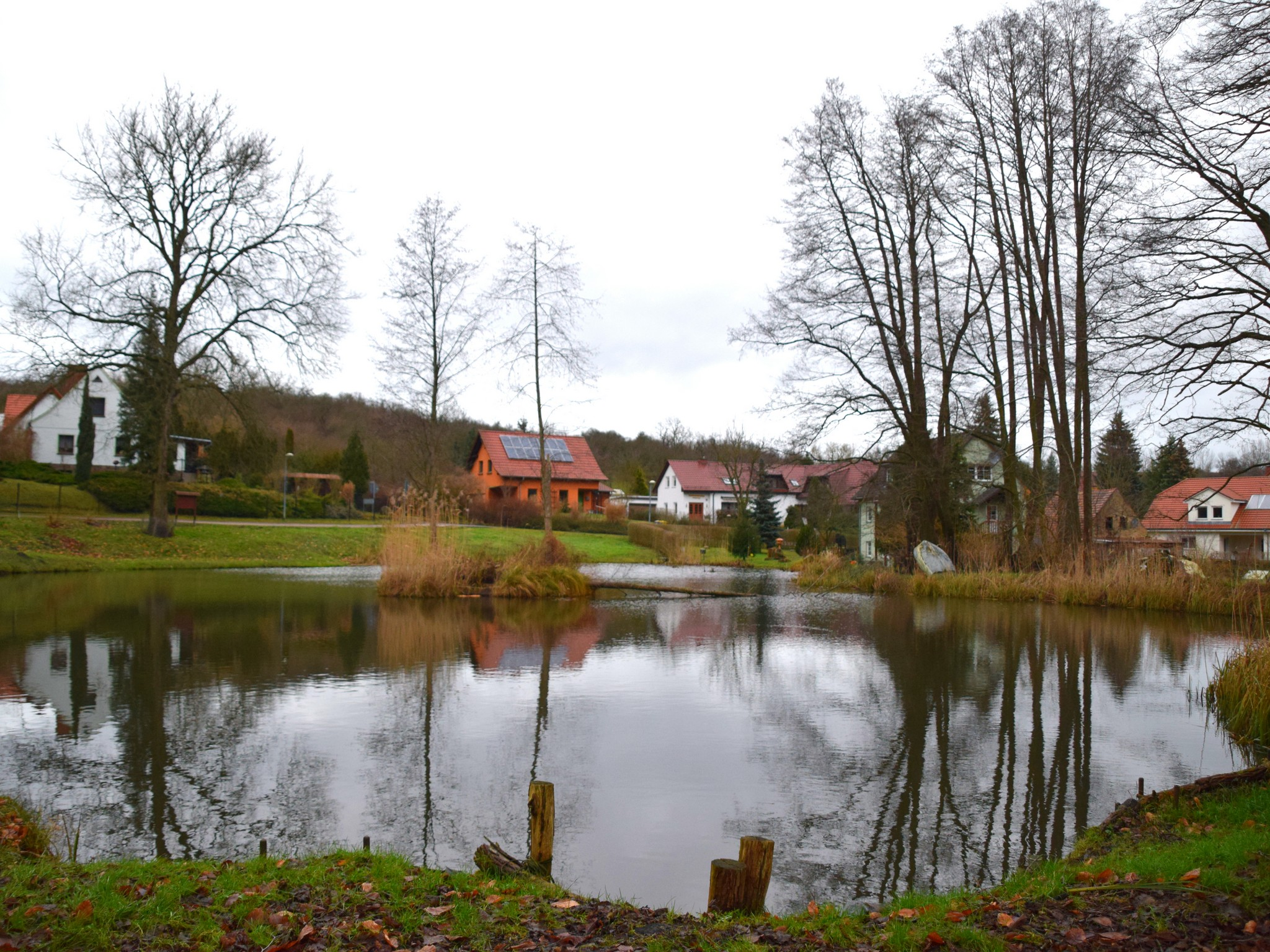 Mauckmühlenteich Frankfurt (Oder)-Güldendorf